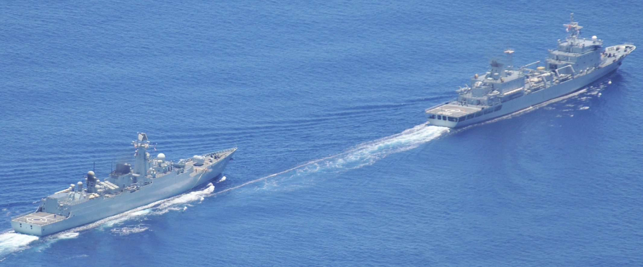 ６月１０日（水）午後０時頃、海上自衛隊第６護衛隊「おおなみ」（横須賀）が、宮古島の南約７００ｋｍの太平洋上を北西進する中国海軍ルーヤンI級ミサイル駆逐艦１隻、ユージャオ級揚陸艦１隻及びダンヤオ級補給艦１隻の合計３隻を確認した。なお、当該艦艇が、西太平洋において、各種訓練を実施しているのを確認した。